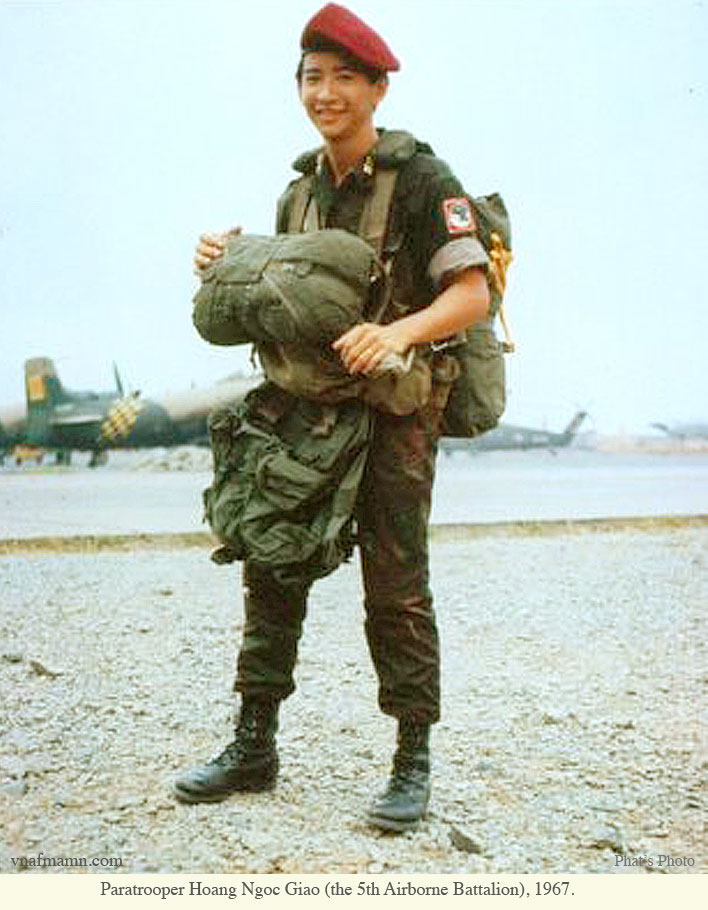 The photo of the Republic of Vietnam Airborne Division.